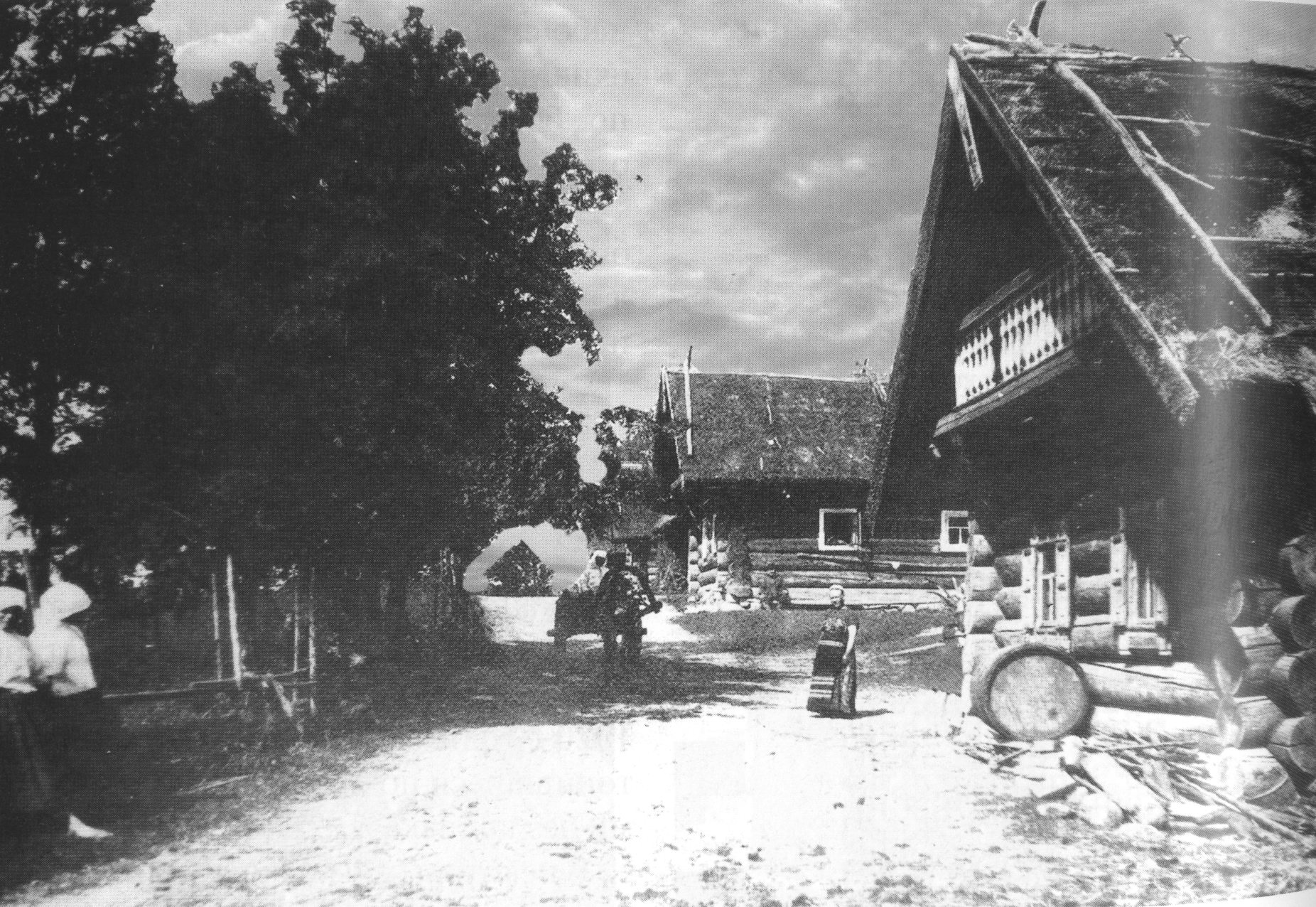 Улица деревни Косколово